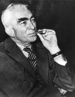 Anker Engelund